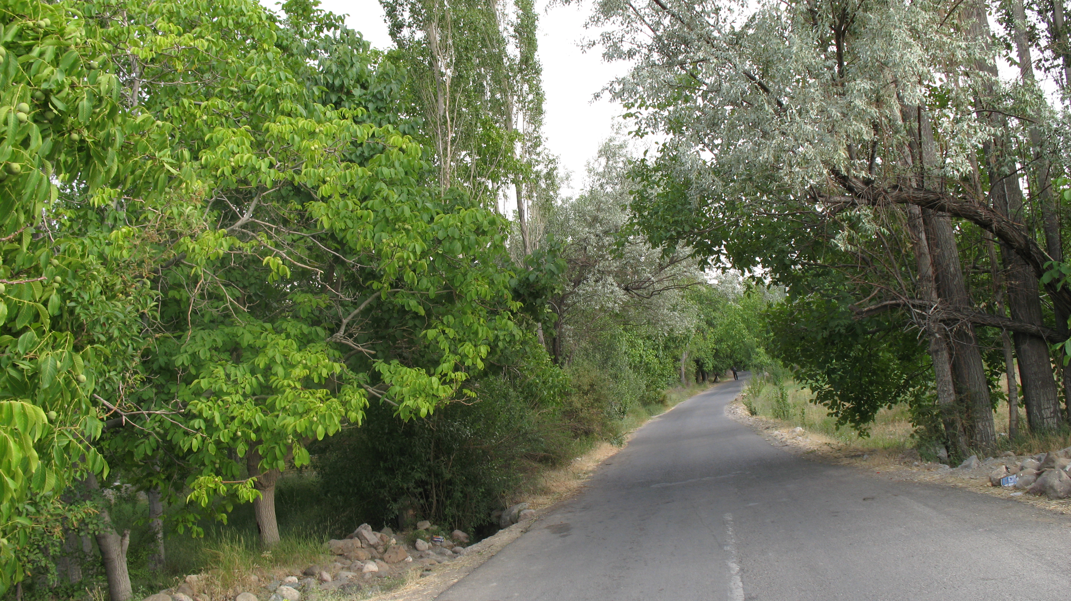 گوغر، دهستانی از توابع بخش مرکزی شهرستان بافت در استان کرمان، ایران است. آب و هوای گوغر نیمه کوهستانی و مهمترین محصول آن گردو است.